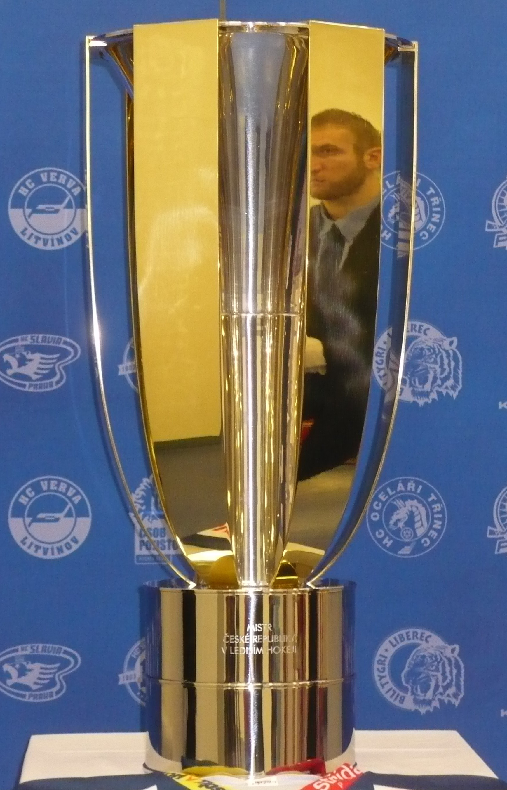 Pohár TGM pro mistra ČR v ledním hokeji. Vyroben roku 2013.